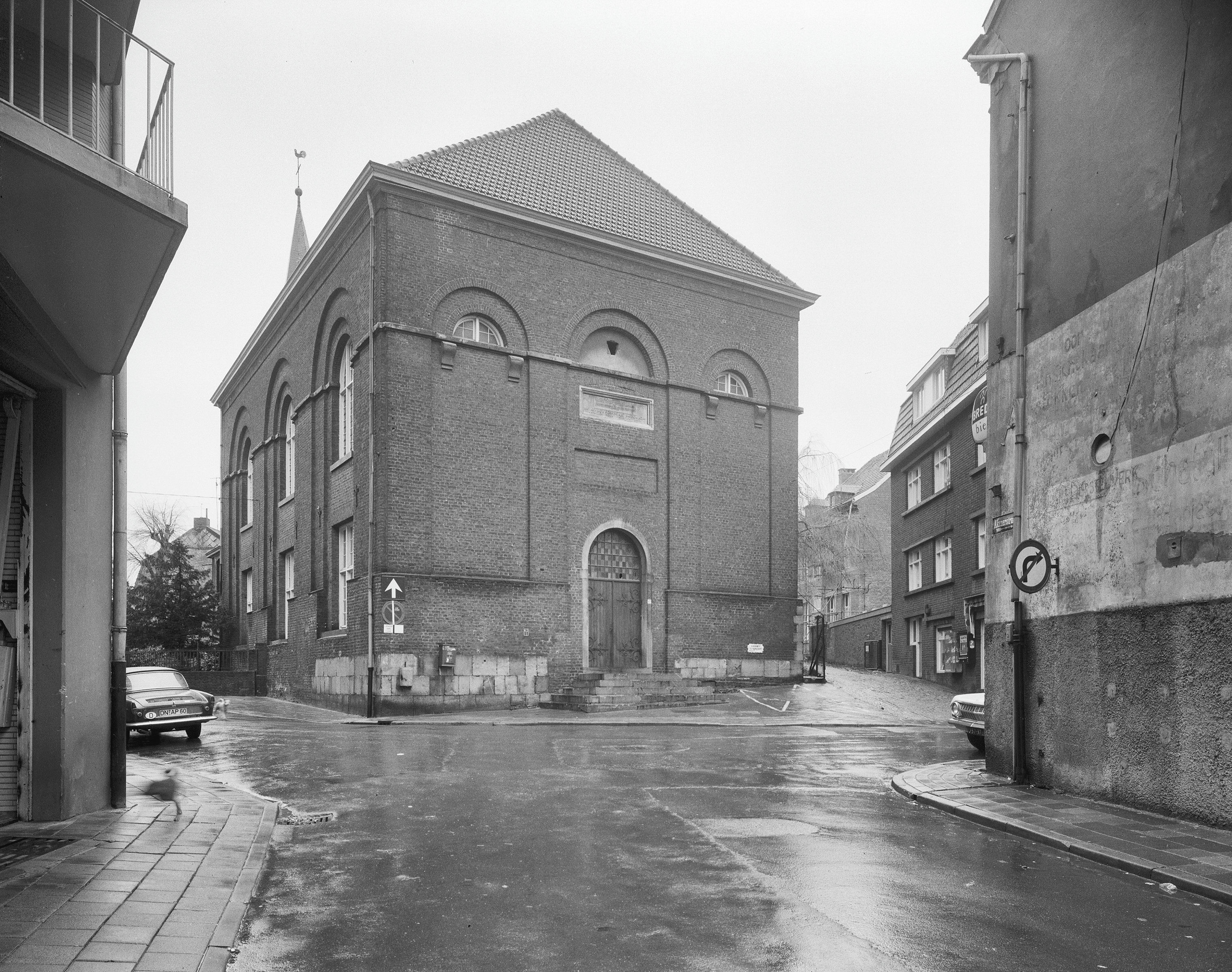 Voormalige Rooms-Katholieke Kerk: overzicht exterieur